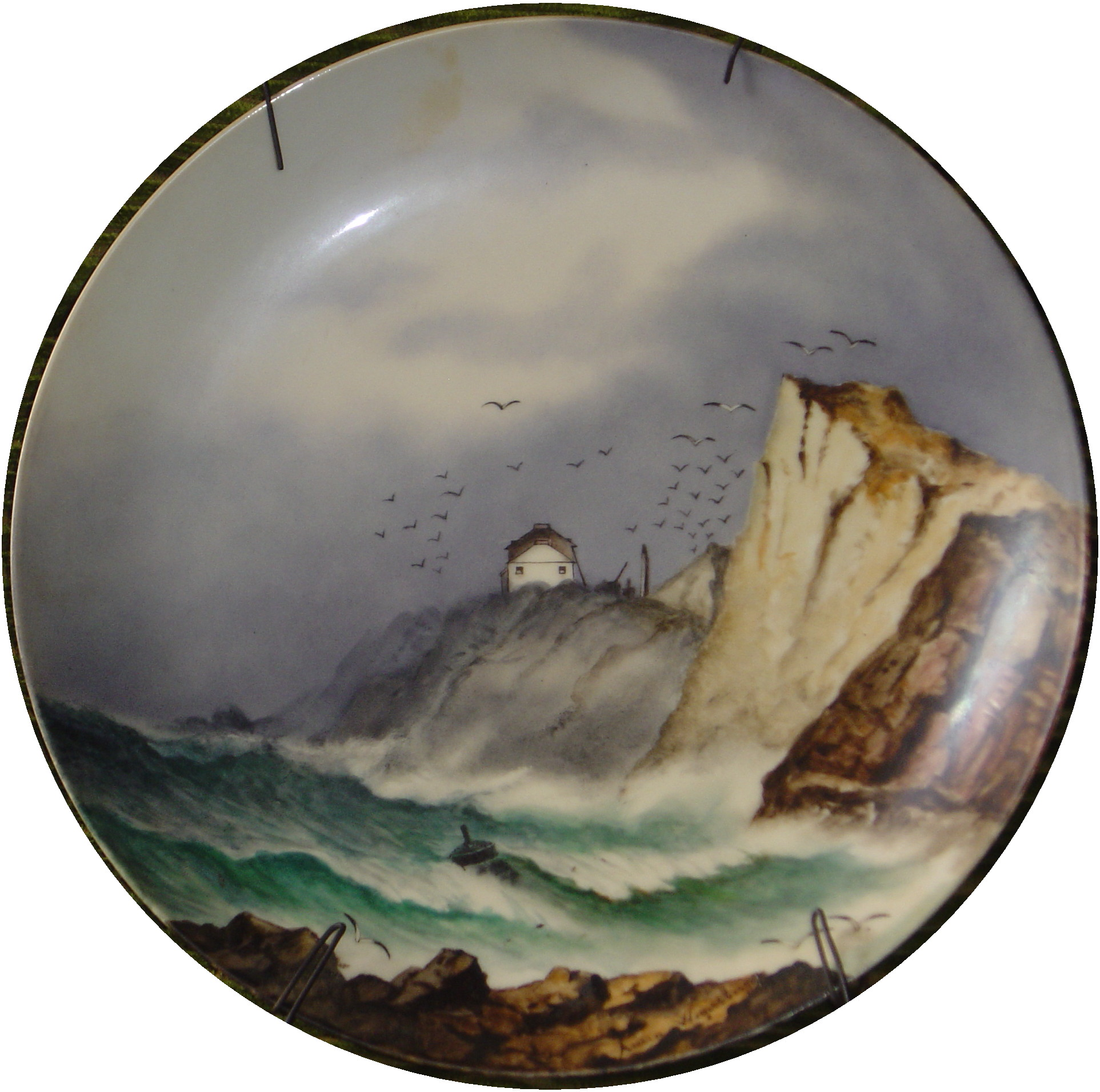 Flots et falaises, assiettte (diam. 28 cm) peinte par Anna Weyersberg en 1887